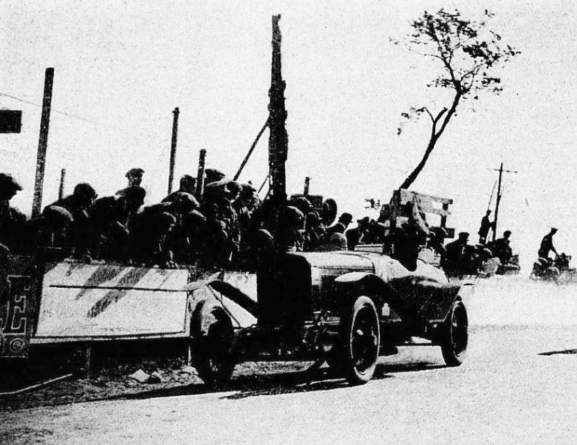 Léonce Garnier sur Hispano-Suiza (Coupe Georges Boillot 1923).